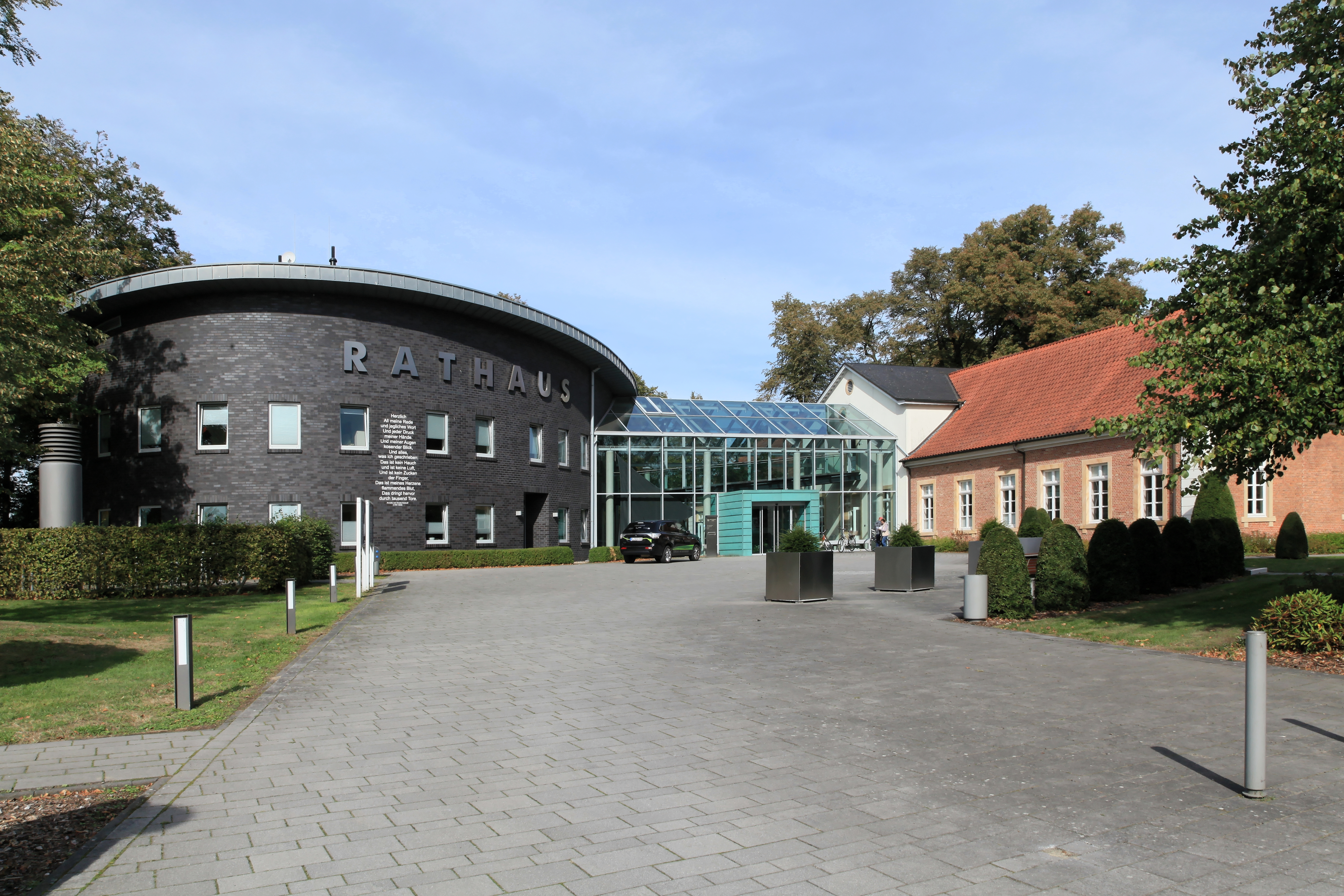 Rathaus und Ludmillenhof, Bahnhofstraße in Sögel